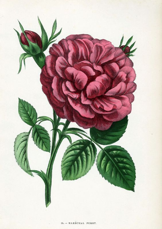 Rose 'Maréchal Forey' (Margottin 1863) in Hippolyte Jamain et Eugène Forney, Les Roses, 1873, Paris, éd. Jules Rothschild.